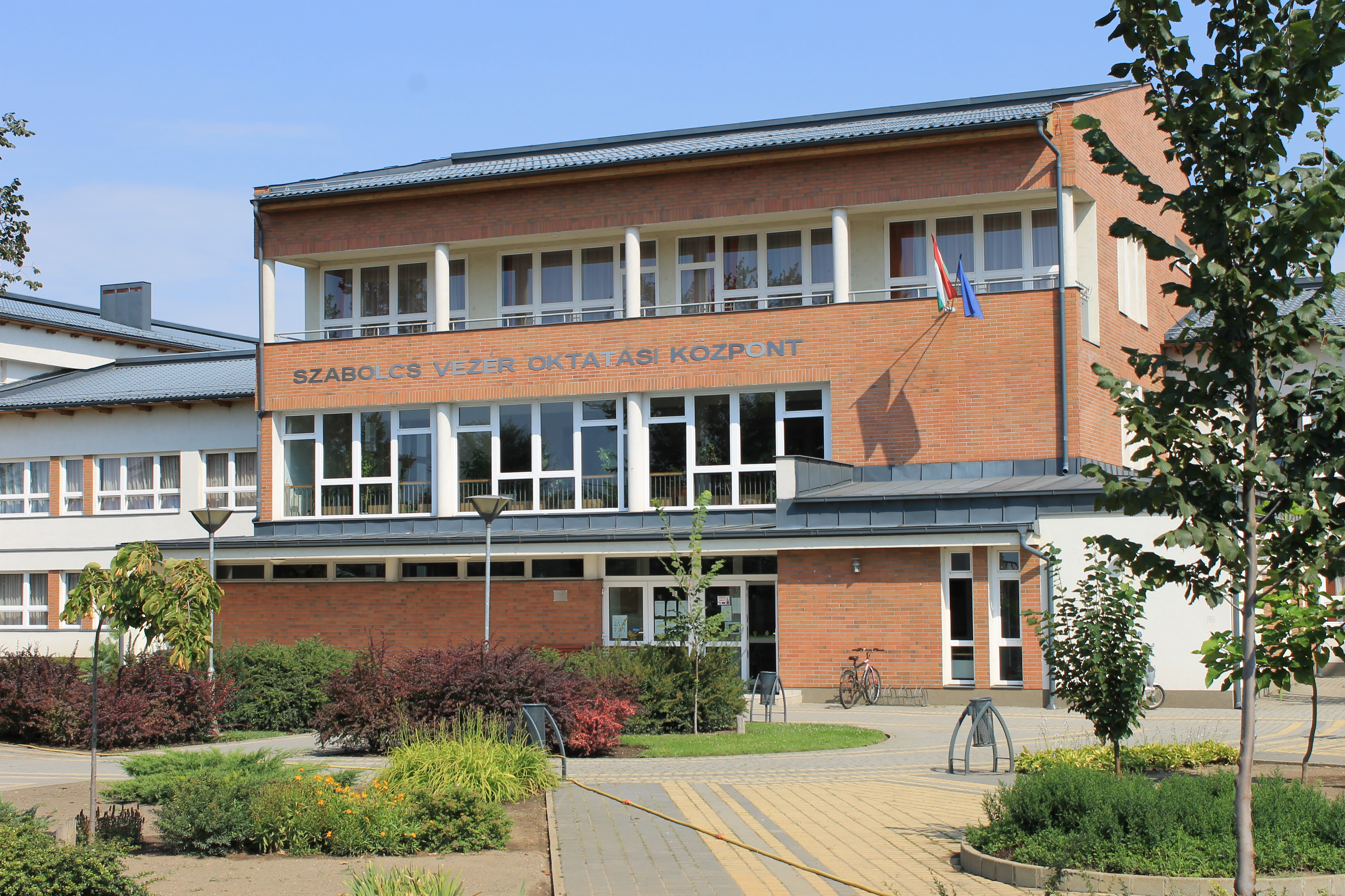 Balkányban épülő Szabolcs vezér iskola